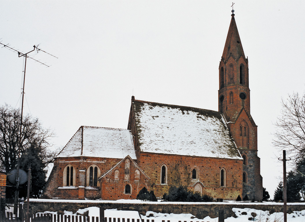 Dorfkirche von Kasnevitz (Mecklenburg-Vorpommern)